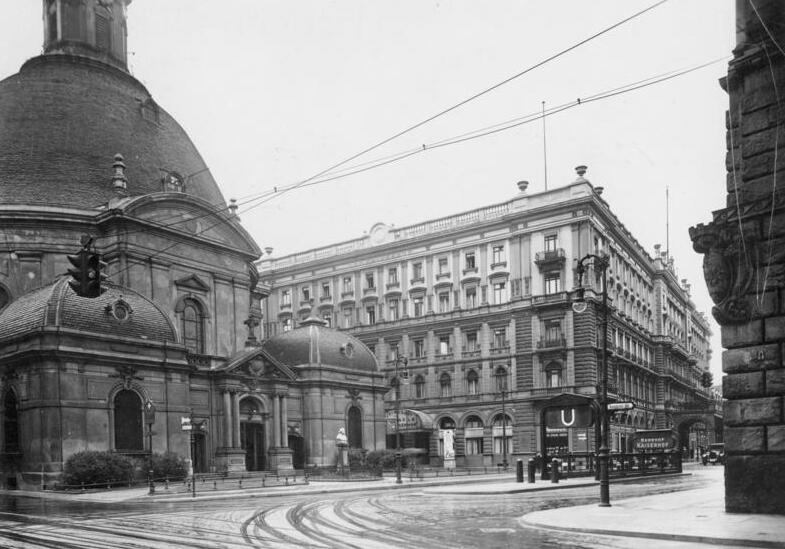 Berlin 1931 Das Hotel "Kaiserhof", in dem die englischen Minister Macdonald und Henderson während ihres Berliner Aufenthaltes wohnen werden. 22167-31 Information added by Wikimedia users.Korrektur: Zu sehen ist der Zietenplatz mit östl. Eingang zum U-Bhf. Kaiserhof (heute Mohrenstr.), nicht der sich anschließende Wilhelmplatz, an dem die Seitenfront des Hotels Kaiserhof lag.